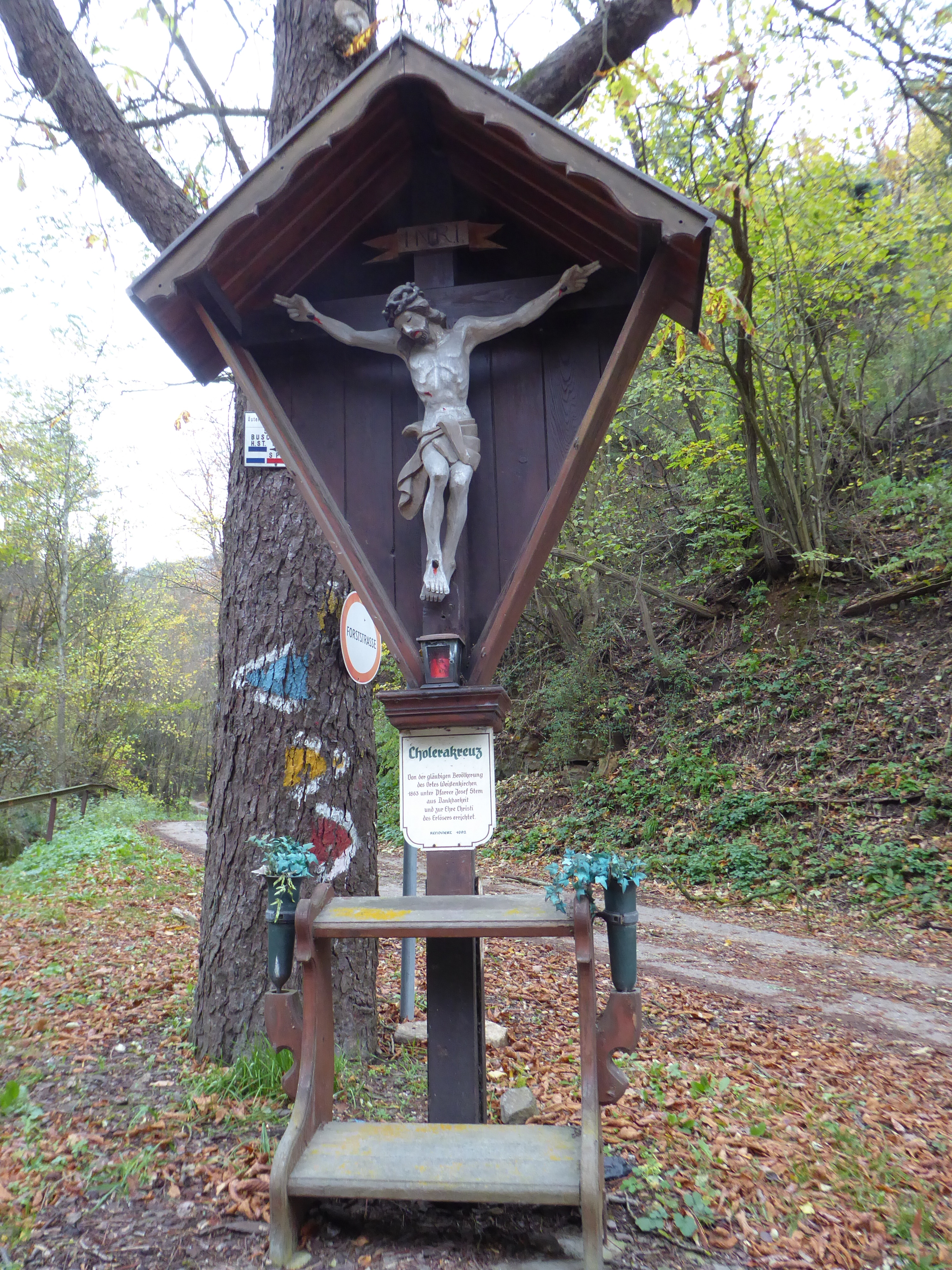 Cholerakreuz an der Grubstaße nördlich von Weißenkirchen in der Wachau, Niederösterreich